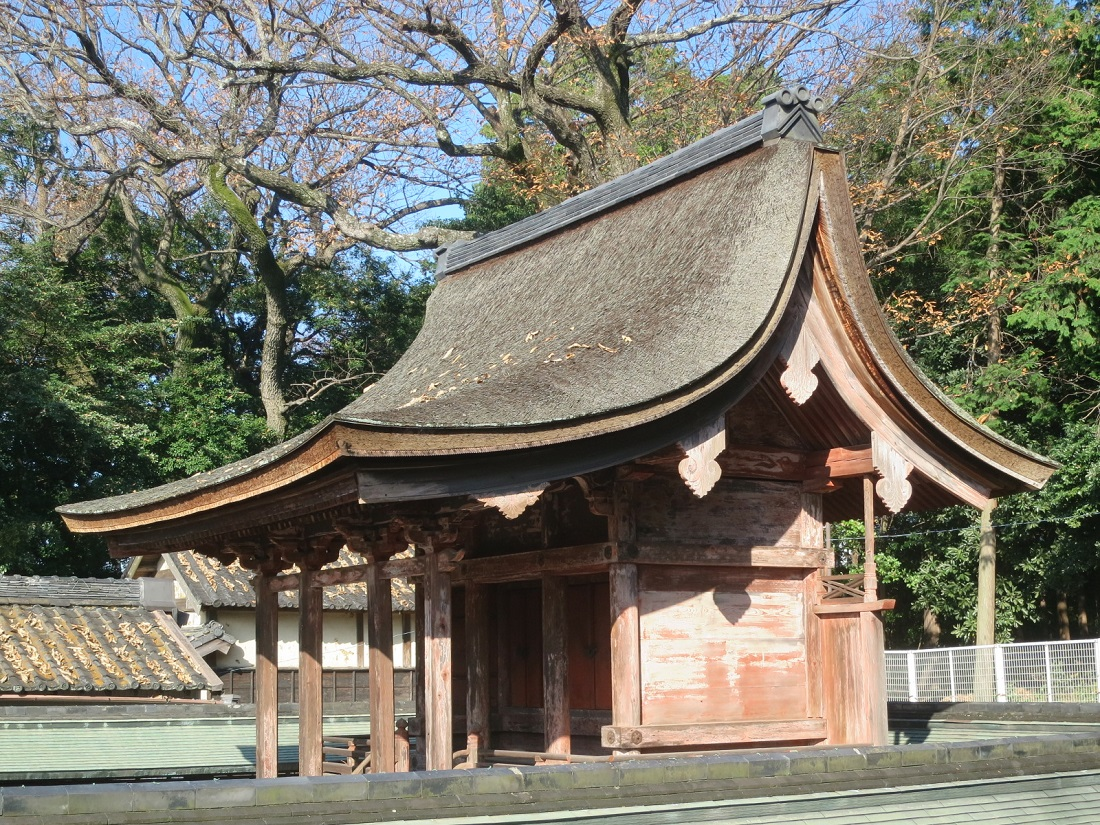 岡崎市 上地八幡宮本殿